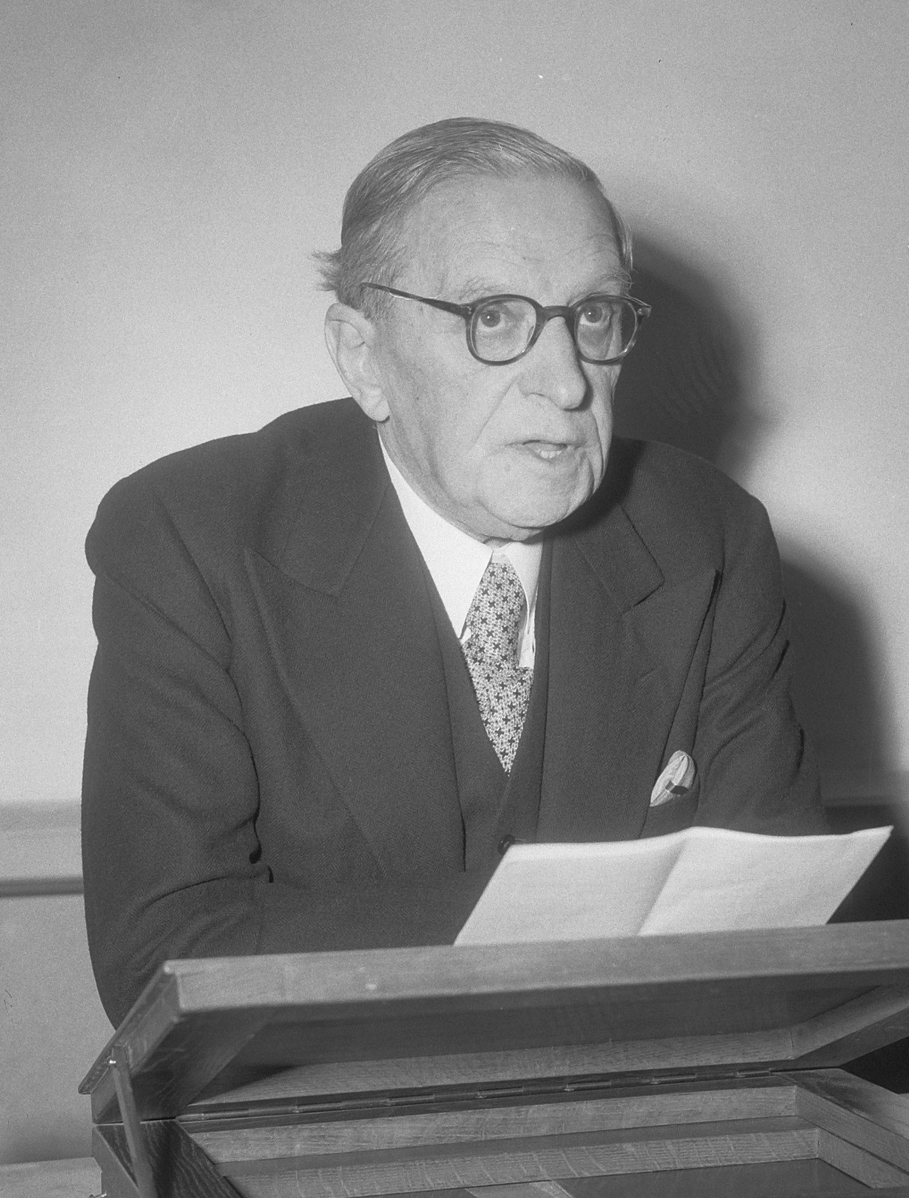 Prof. dr. Géza Revesz 75 jaar (huldiging Amsterdam, 1953)